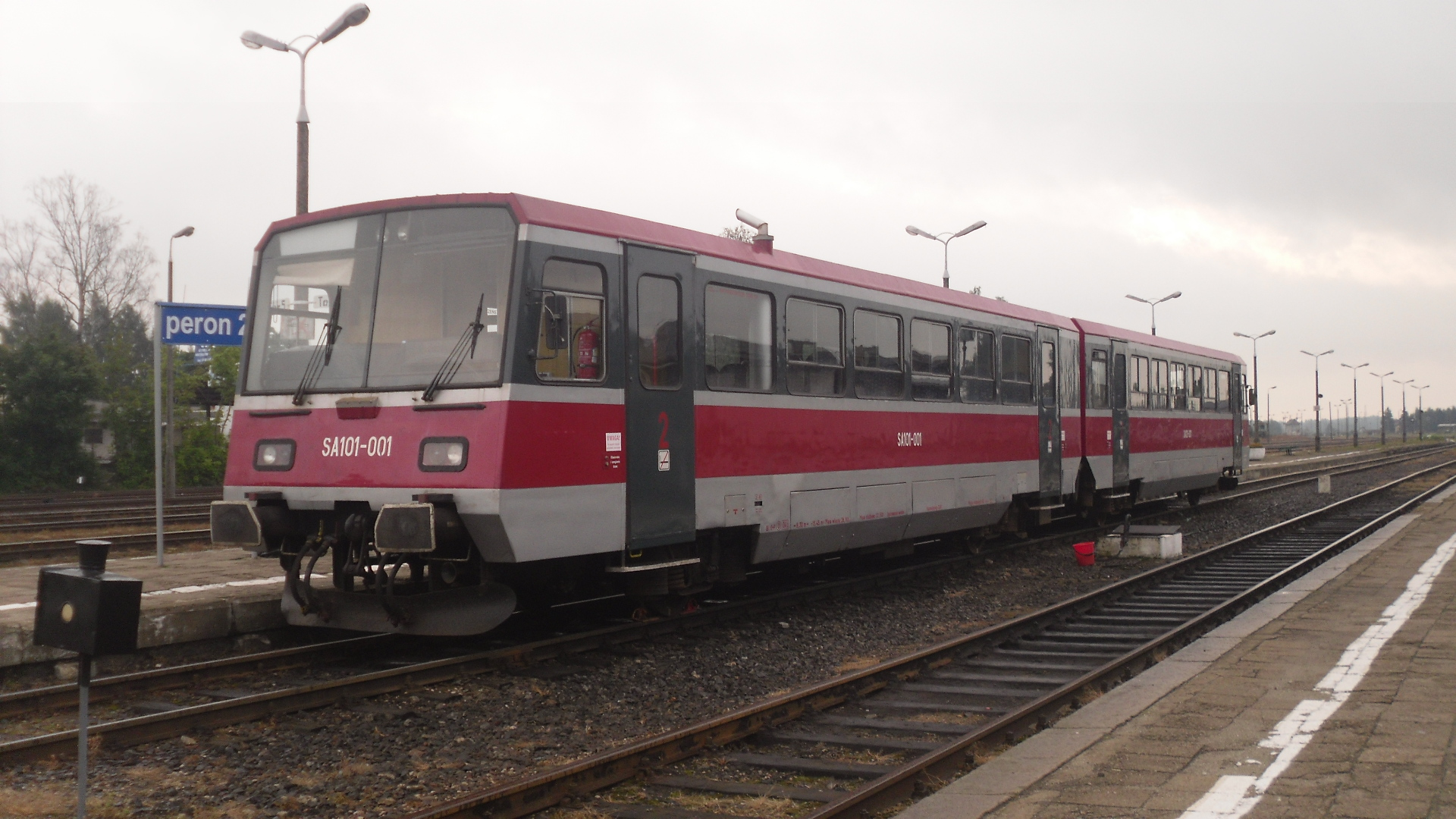 SA101-001 w Kościerzynie.